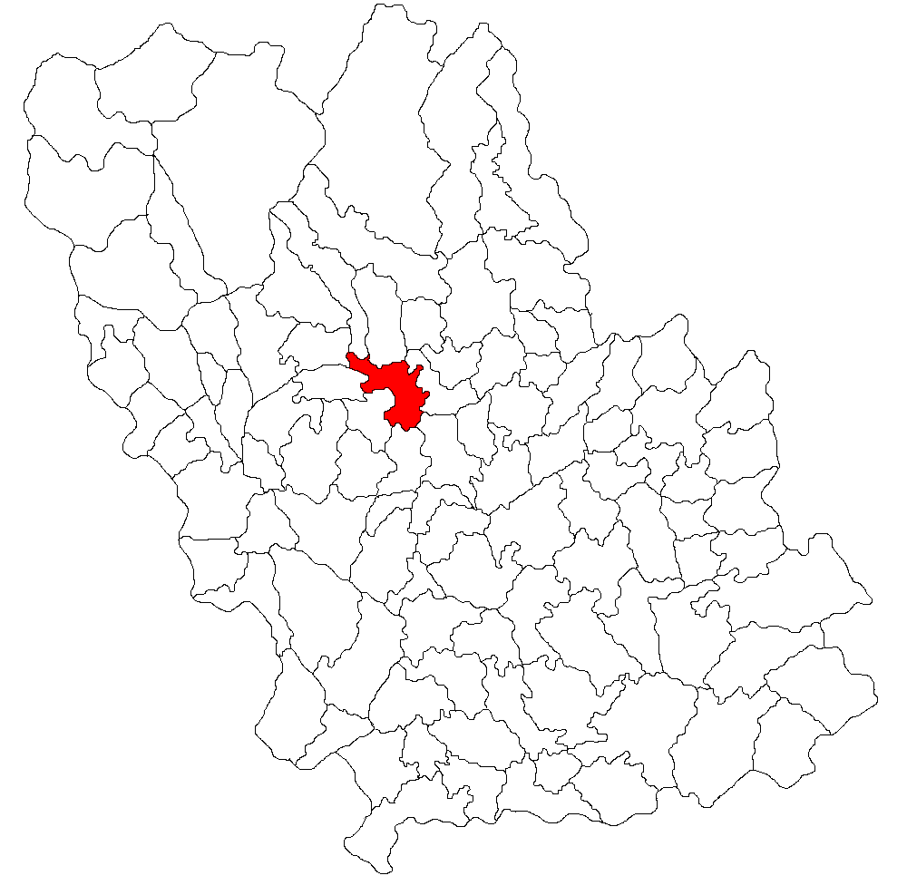 Categorie:Hărţi ale judeţului Prahova